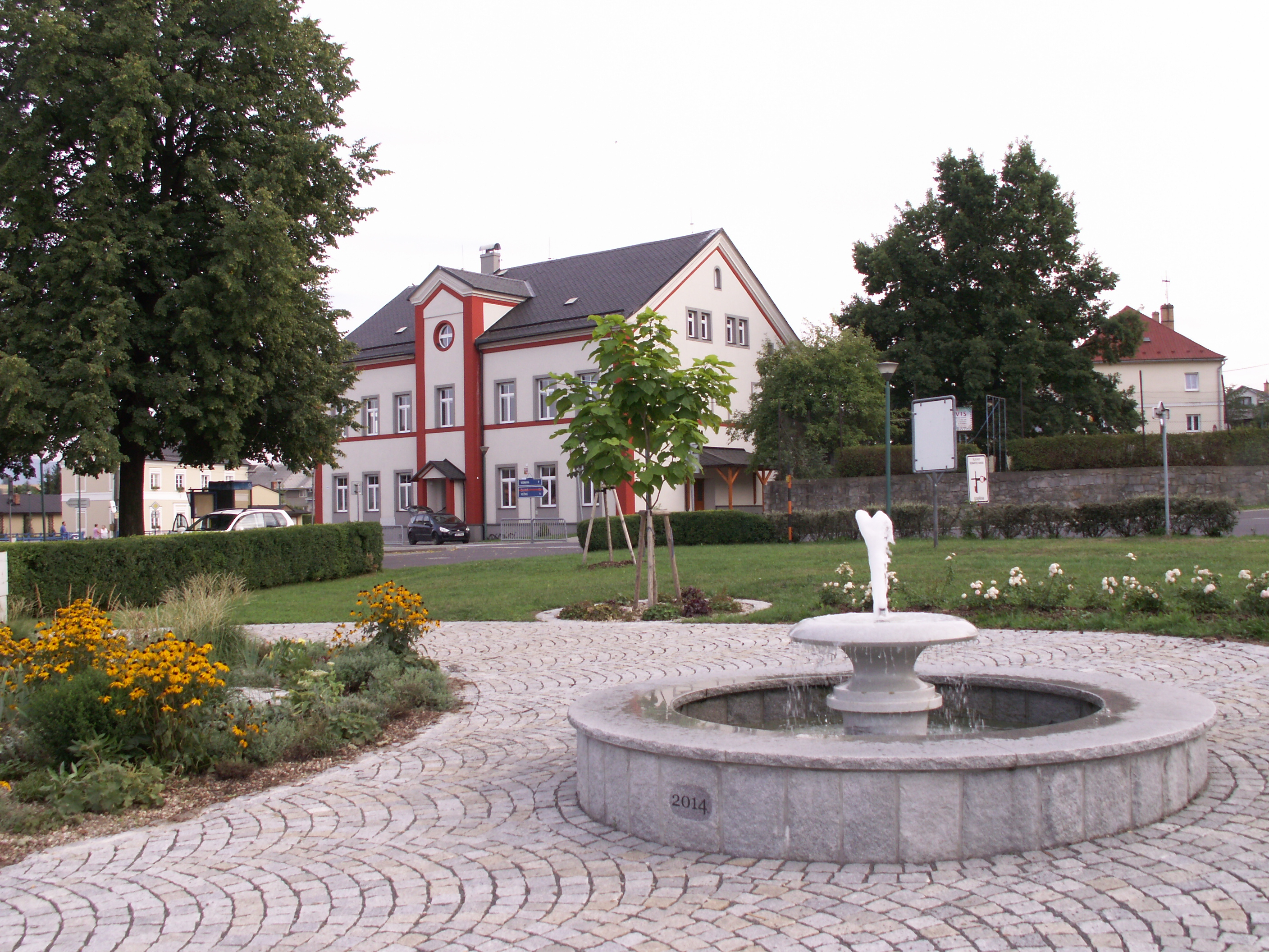 Bernartice, okres Jeseník, budova základní školy (č.p. 259)